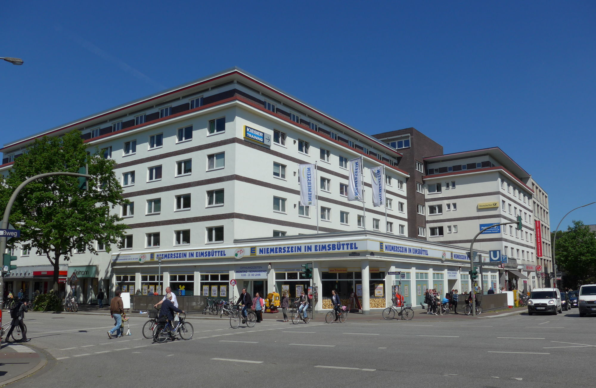 Wohn- und Geschäftshaus in Hamburg-Eimsbüttel Entwurf: Karl Schneider 1927/28